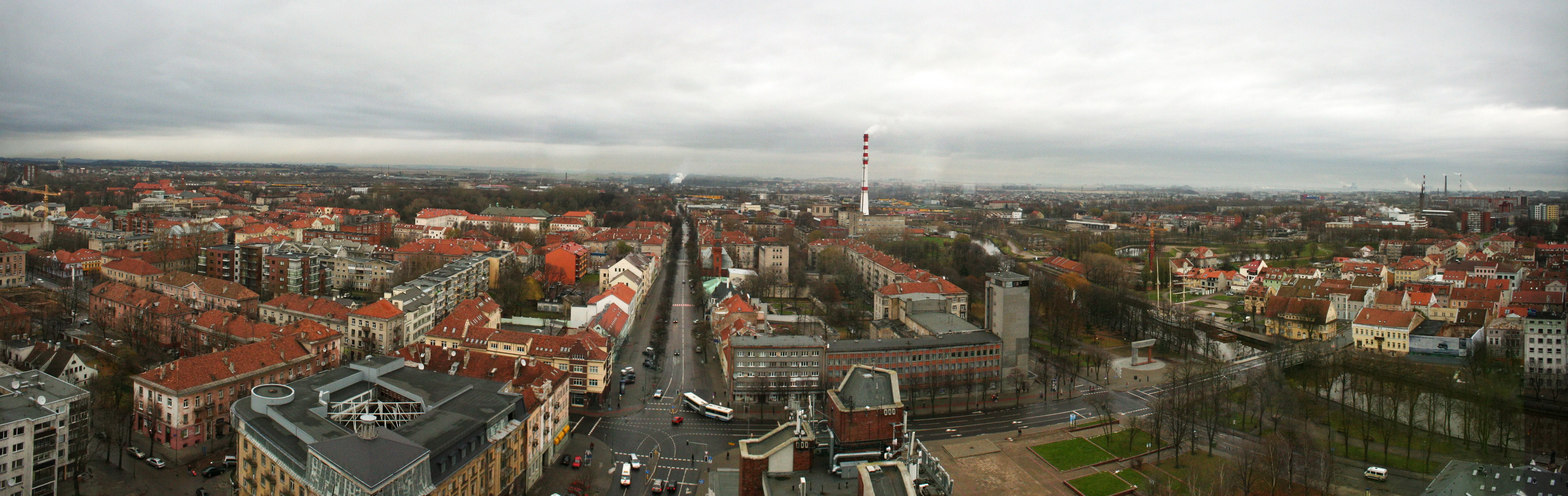 Klaipėda city panorama